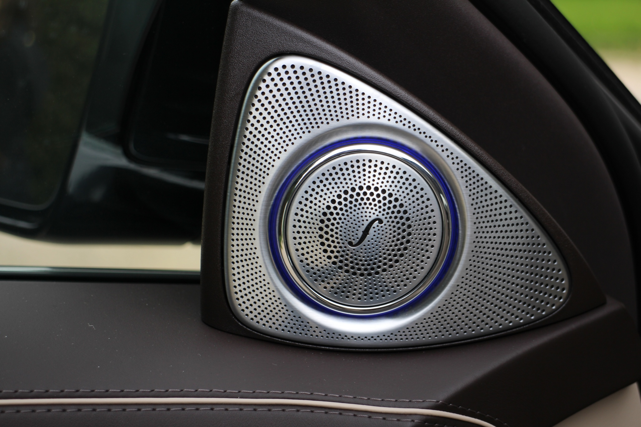 S63 AMG 2013